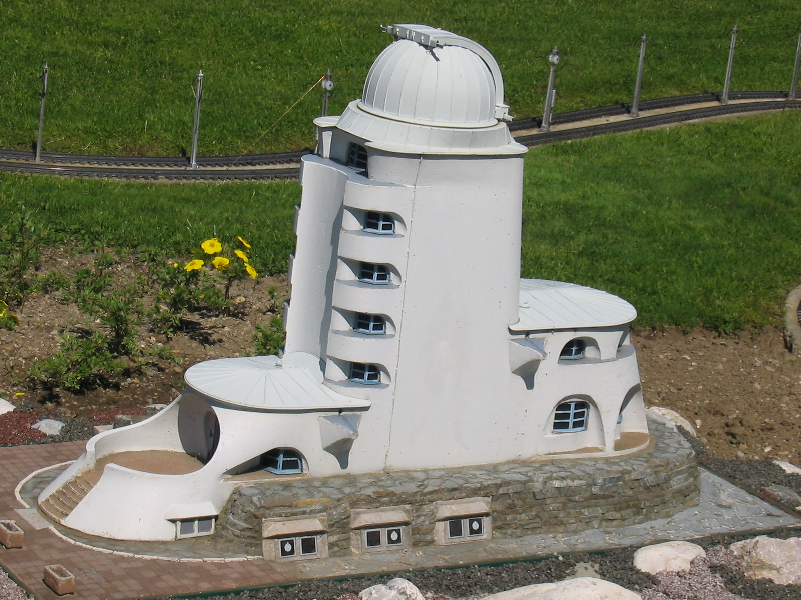 Einsteinturm Potsdam at Minimundus klagenfurt